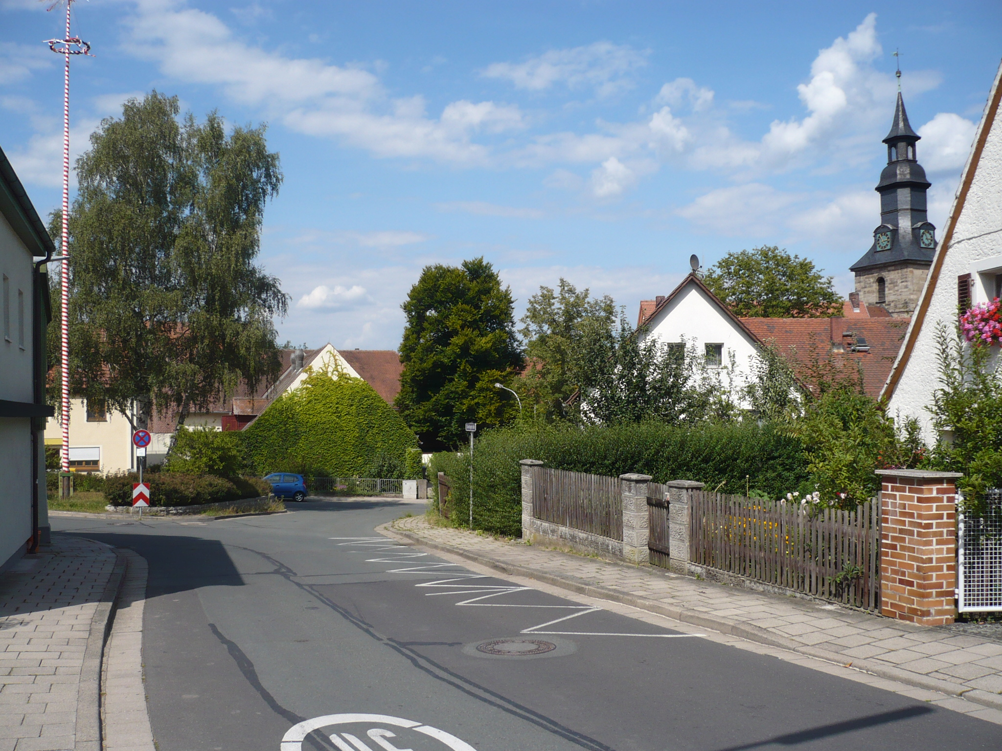 Sonntagstraße Bayreuth